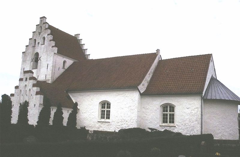 Sønder Broby Kirke i Danmark. Sønder Broby kirke